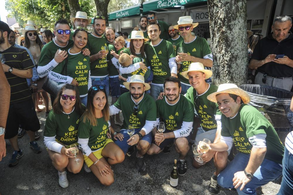 Inauguración fiesta albariño 2018